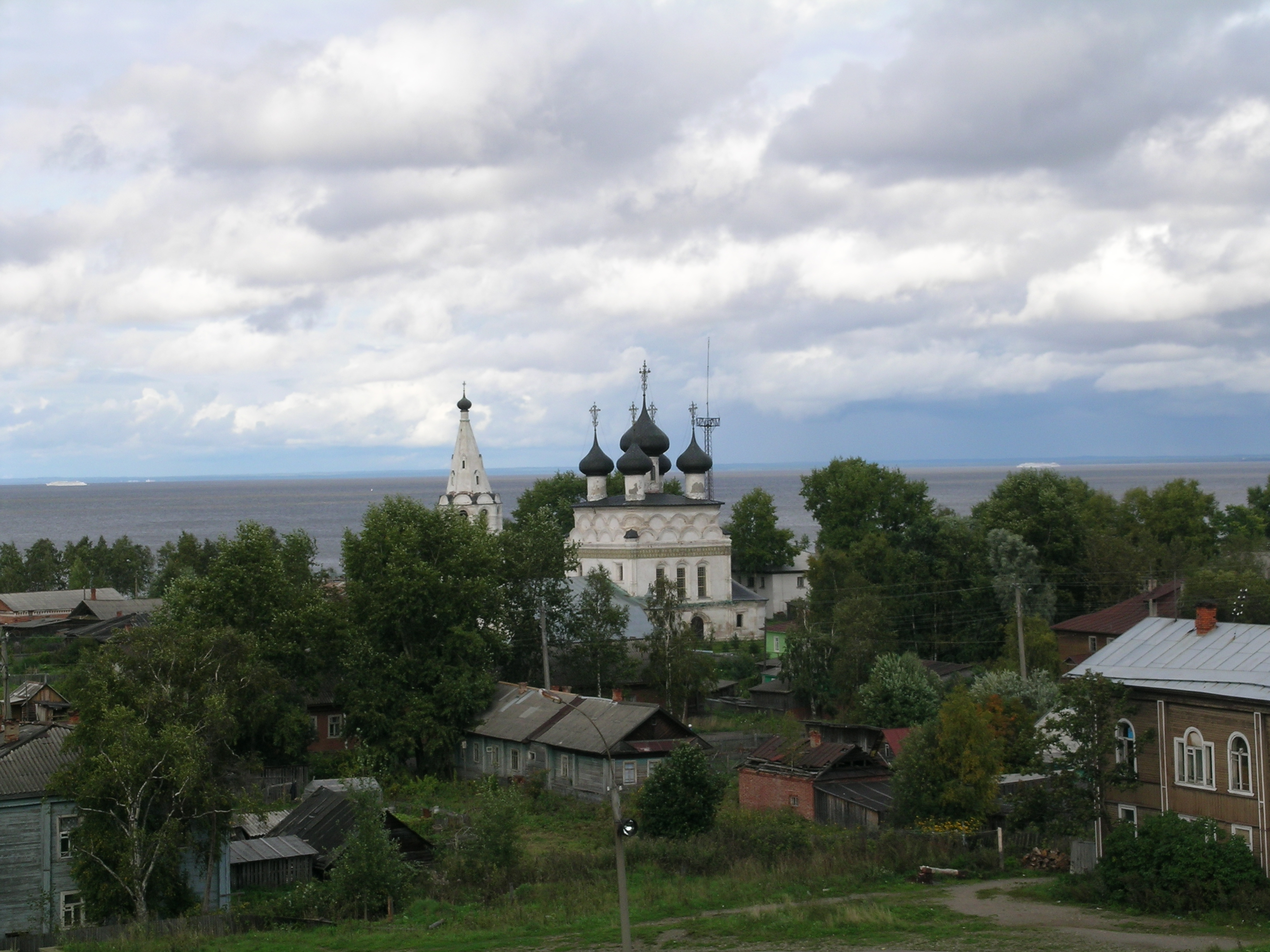 Белозерск - Церковь Всемилостливого Спаса (Вологодская область, Белозерск, улица Дзержинского, 8)